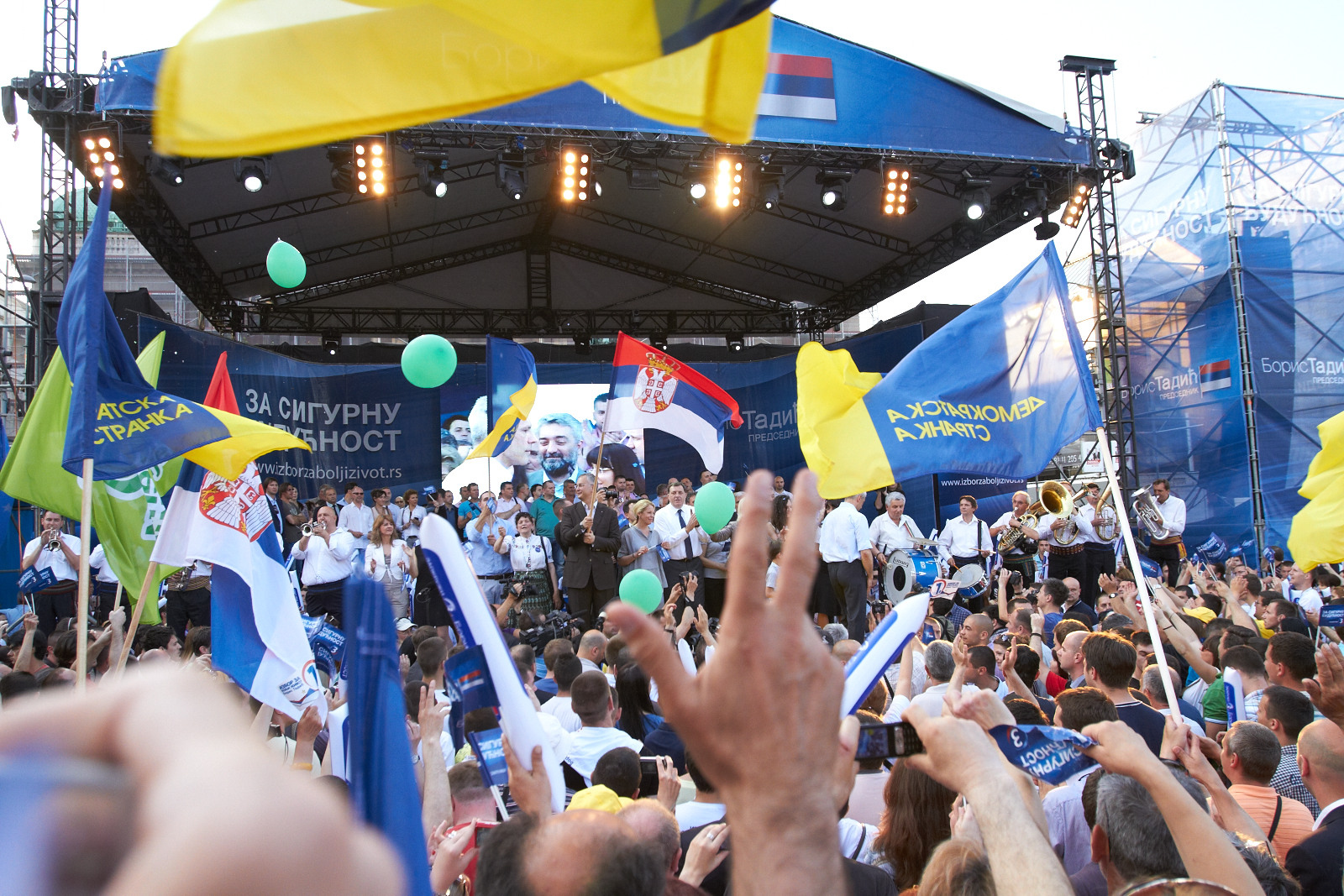 Kandidat za predsednika Srbije i predsednik Demokratske stranke Boris Tadić obratio se građanima na konvenciji "Izbor za bolji život — Boris Tadić" u Beogradu. (2. maj 2012); Foto servis DS